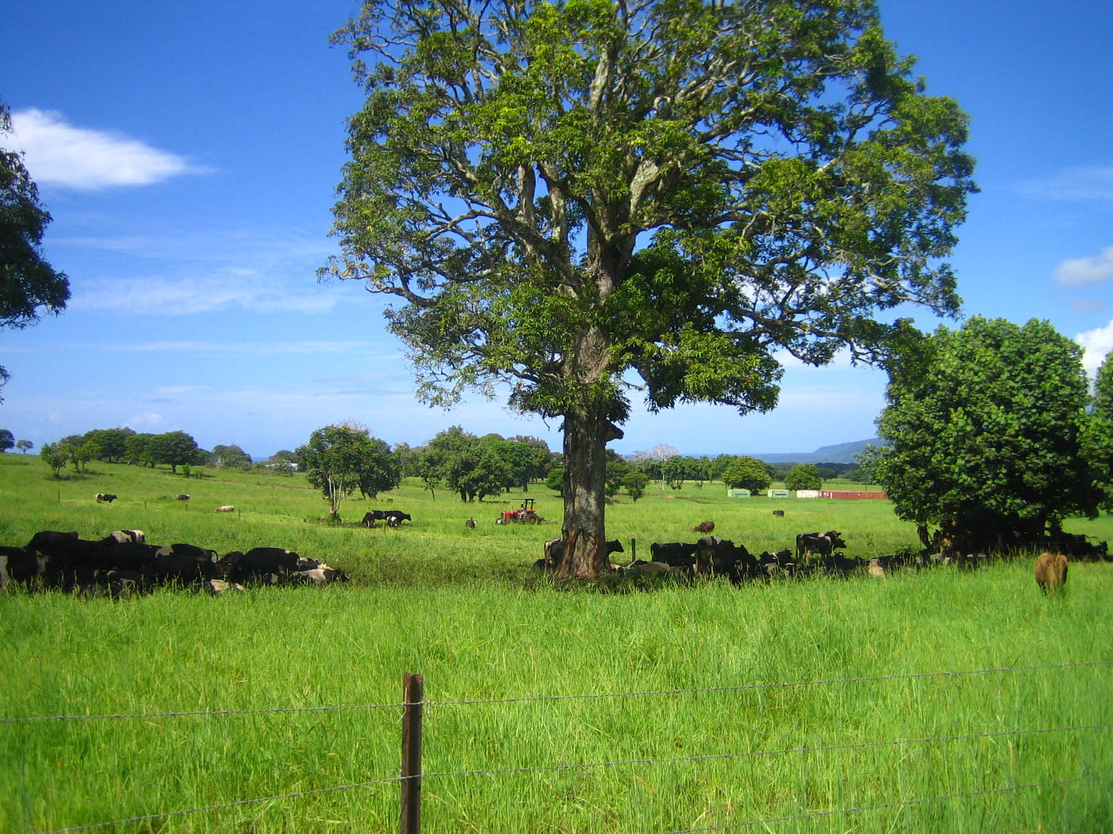 (Photo personnel 2006) Utilisateur:FRED